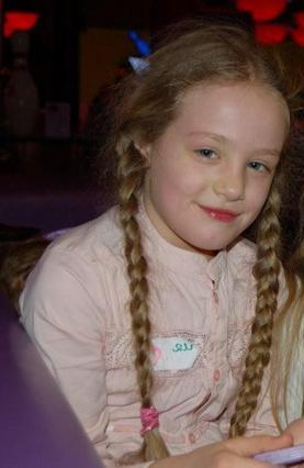 Wiktoria Gąsiewsja